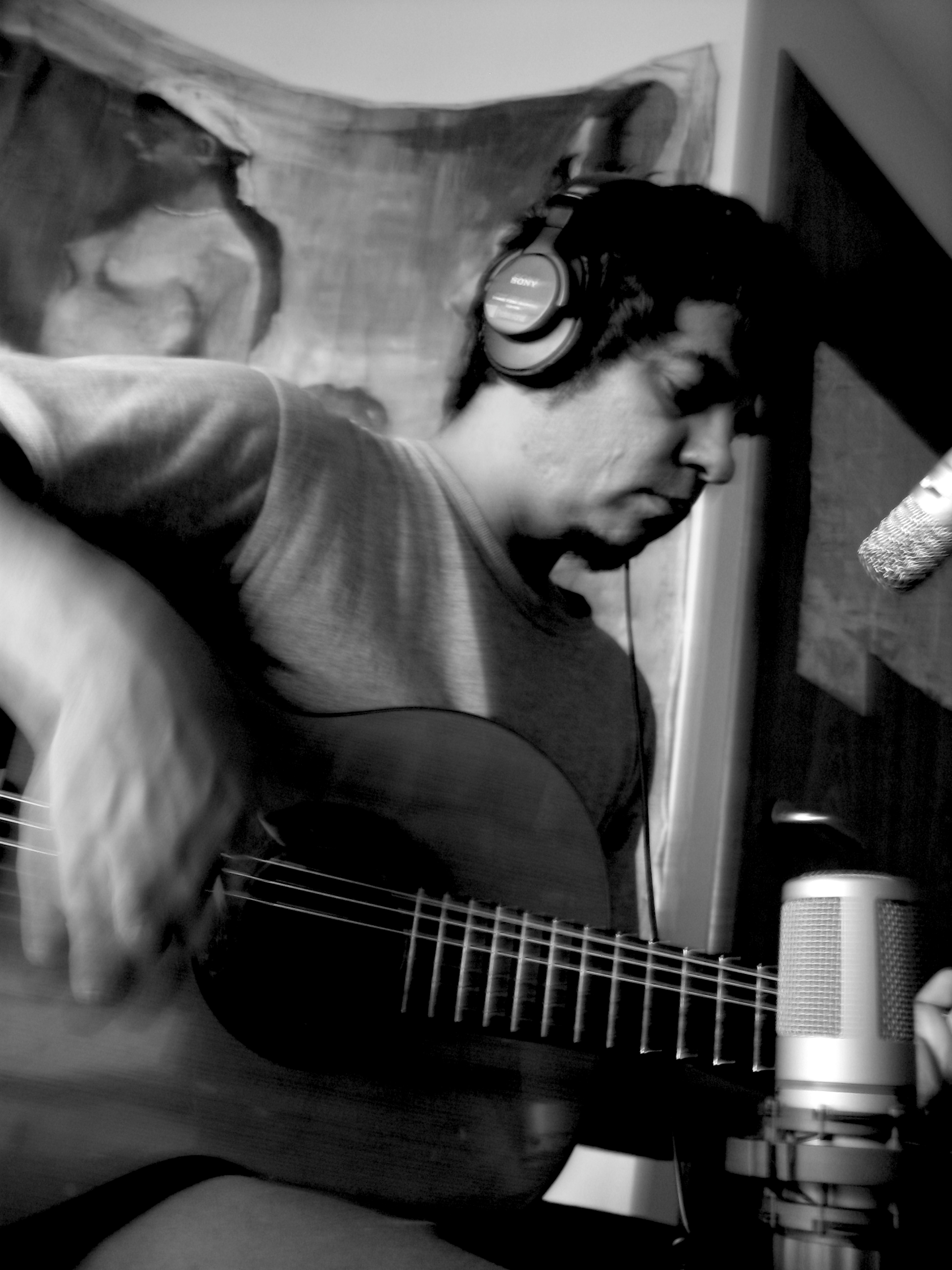 Grabación del disco Loma